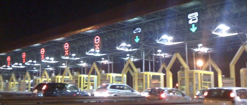 Ivanja Reka toll plaza